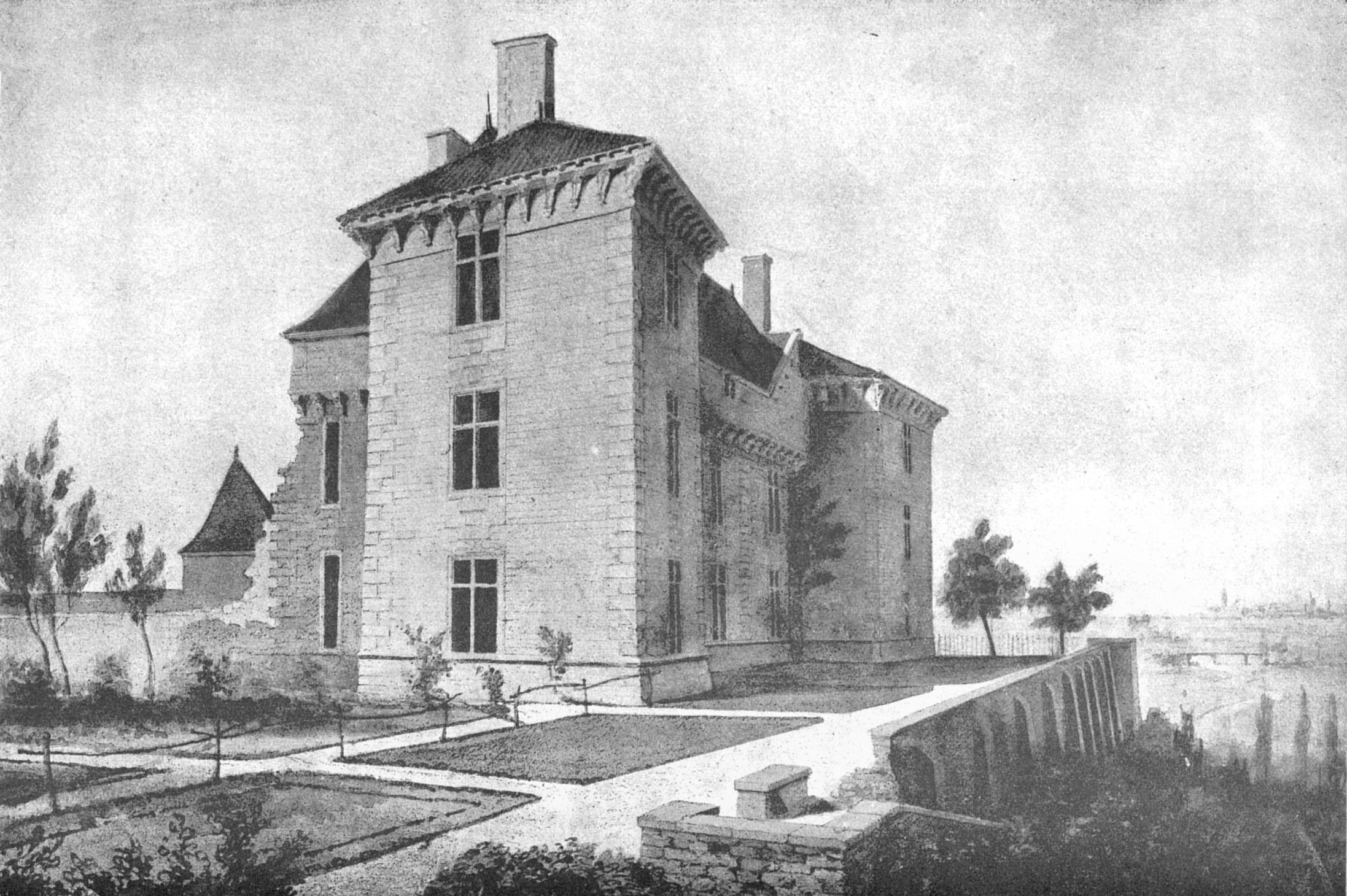 Schloss Montbras in Lothringen